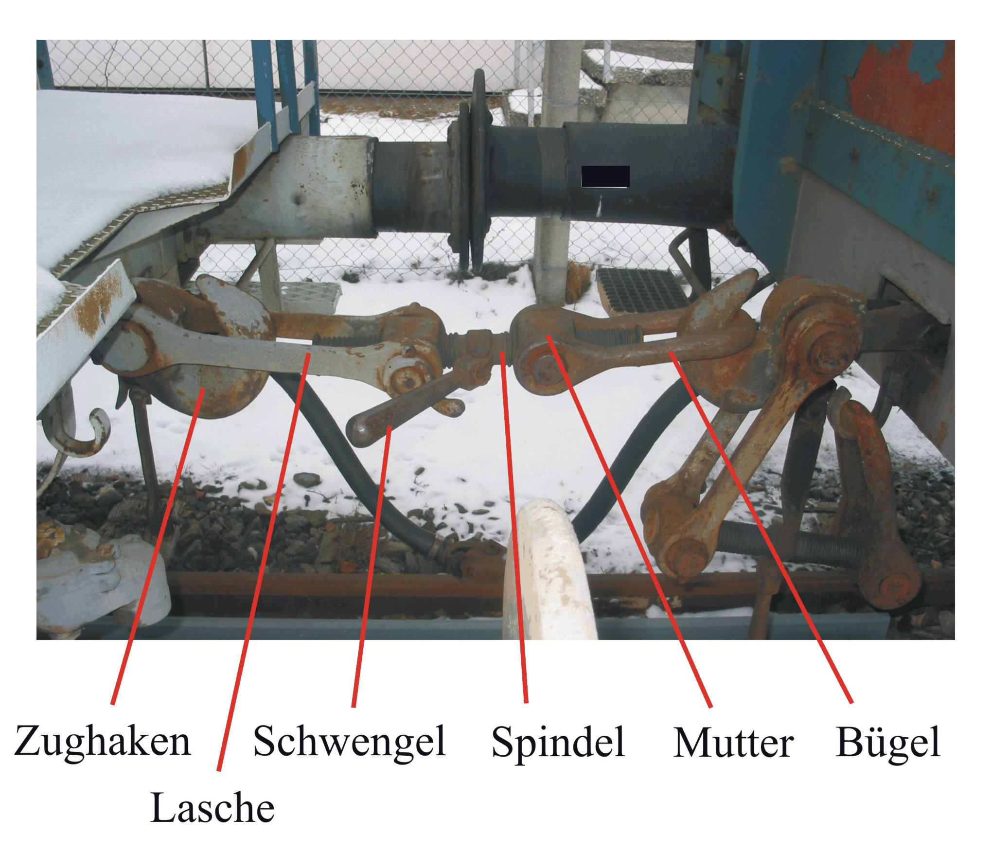 Schraubenkupplung mit Bezeichnung der Bauteile